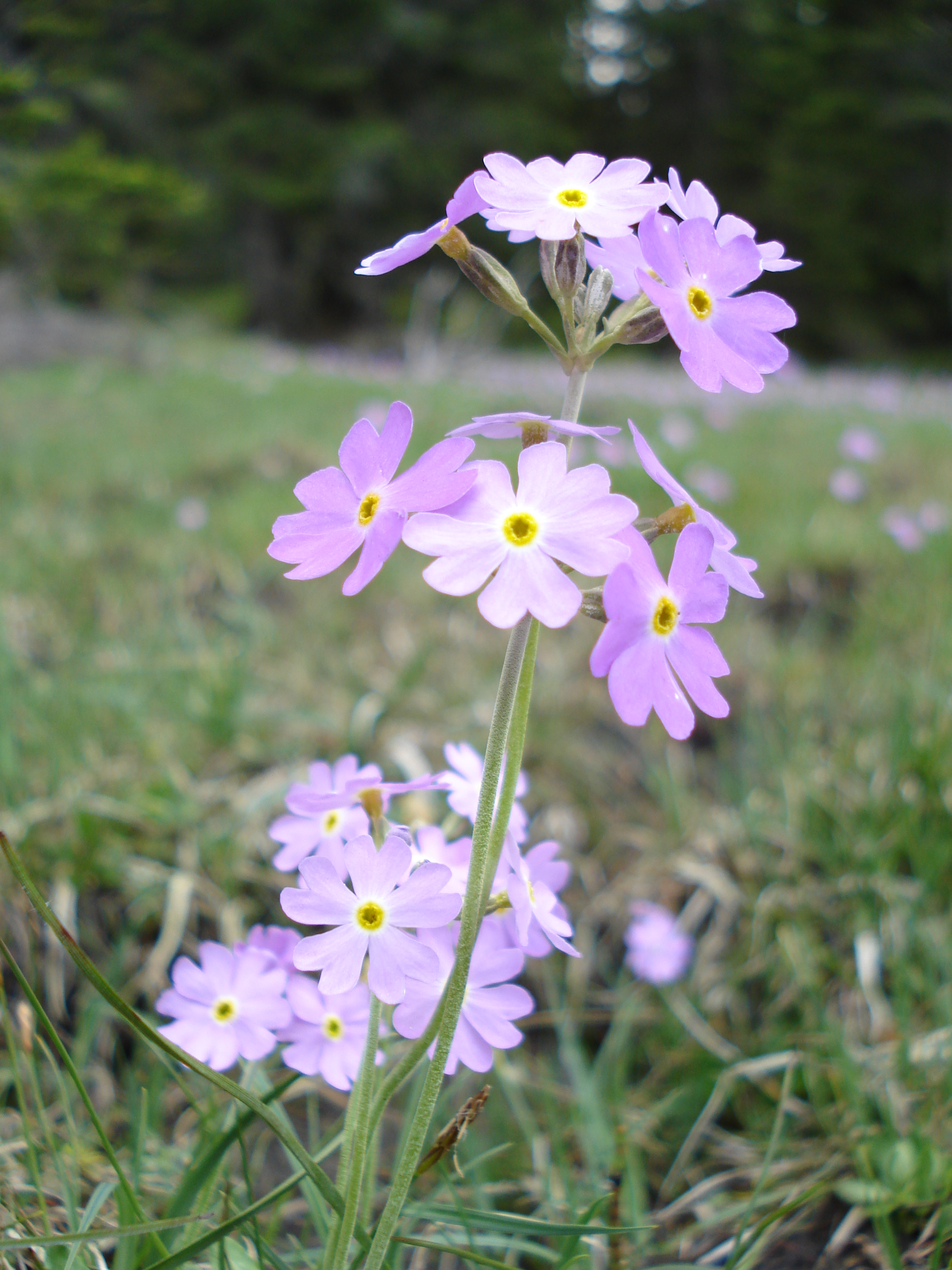 Mehl-Primel (Primula farinosa)